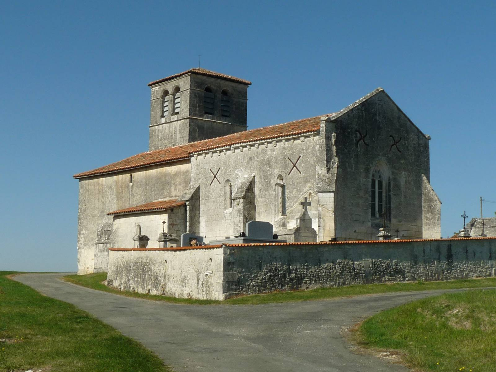 église de Fontaines, Champagne-et-Fontaine (24), France